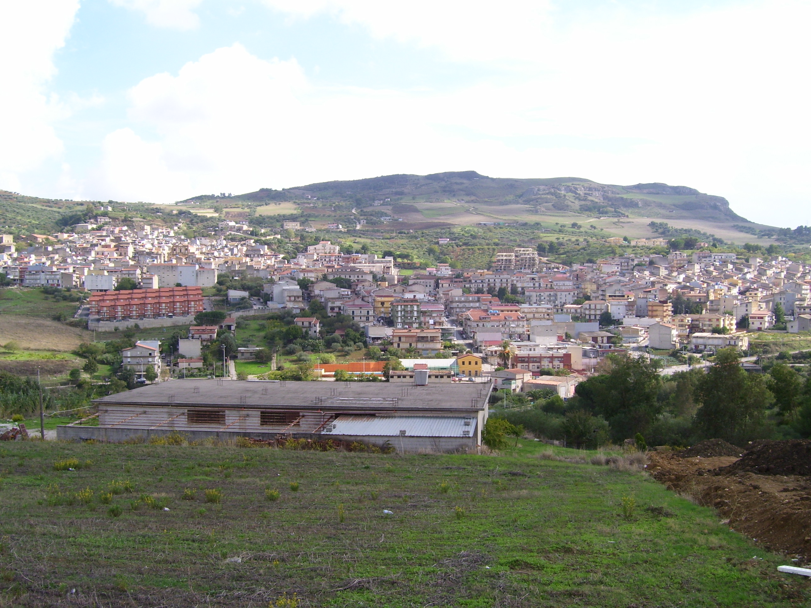 Panorama del paese di Villafrati